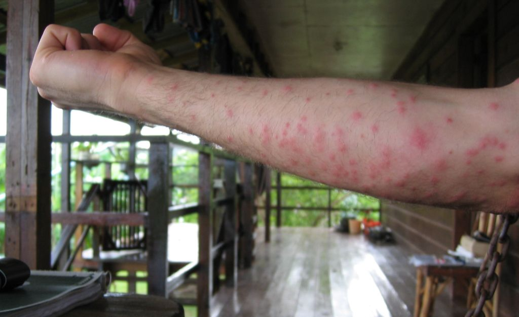 Zu sehen: Arm mit Vielzahl an Phlebotomen-Stichen (Sandfliegen / Sandflies / Sandmücken), Fam. Psychodidae. Phlebotomen sind keine guten Flieger und halten sich überwiegend in Bodennähe auf, wo sie am liebsten an den Knöcheln Blut saugen (dünne Haut, unbedeckt von Textilien). Allerdings stechen sie auch gerne woanders, wenn sich die Gelegenheit ergibt. Wenn Repellentien nicht mehr wirken hilft vor allem eins: eine dicke Schicht Baby-Öl. Die Stiche stammen aus einem Zeitraum von ca. einer Stunde in häuslicher Umgebung ohne Insektenschutzmittel.